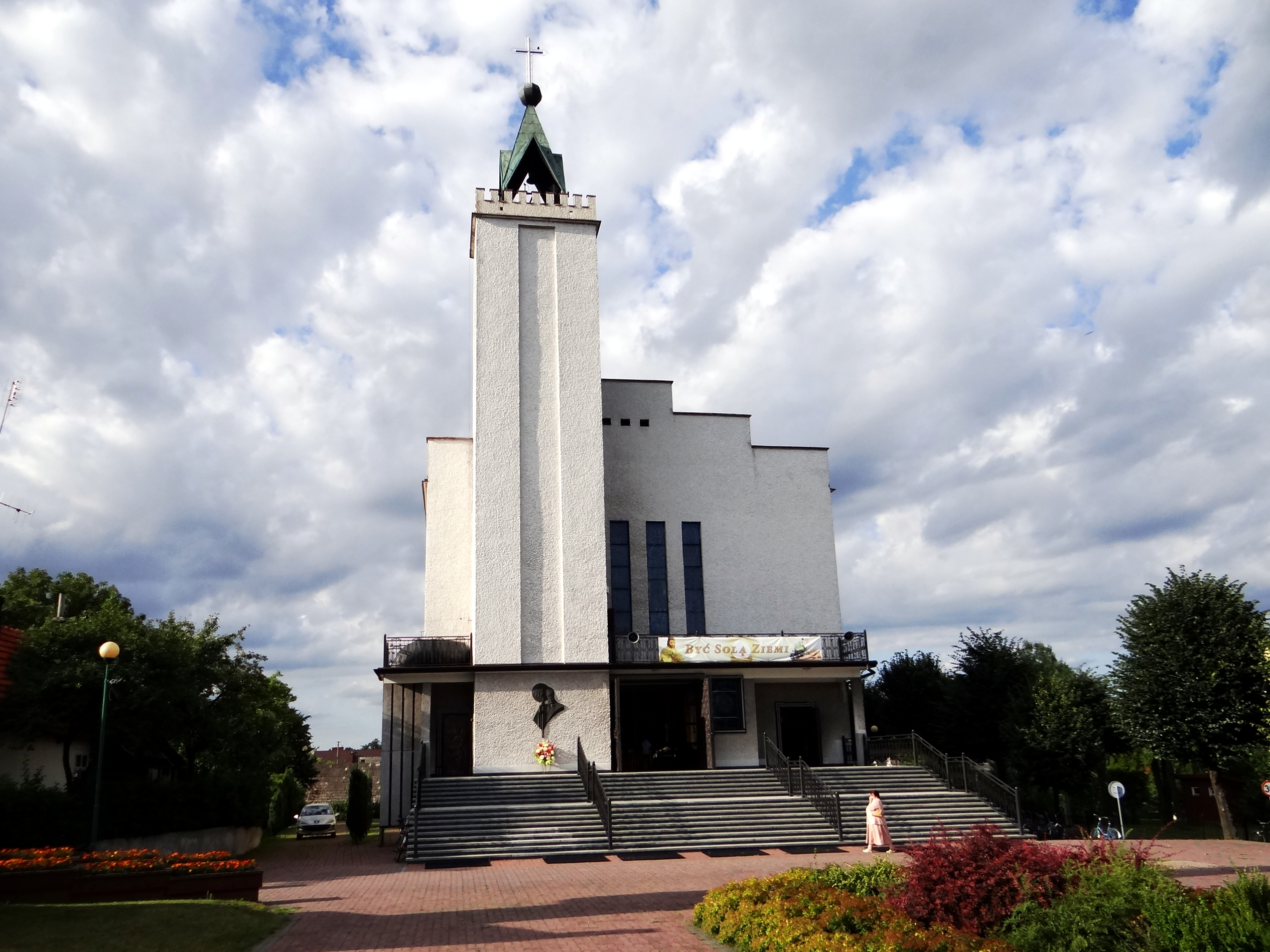 Kostel v obci Ruda Łańcucka, Polsko